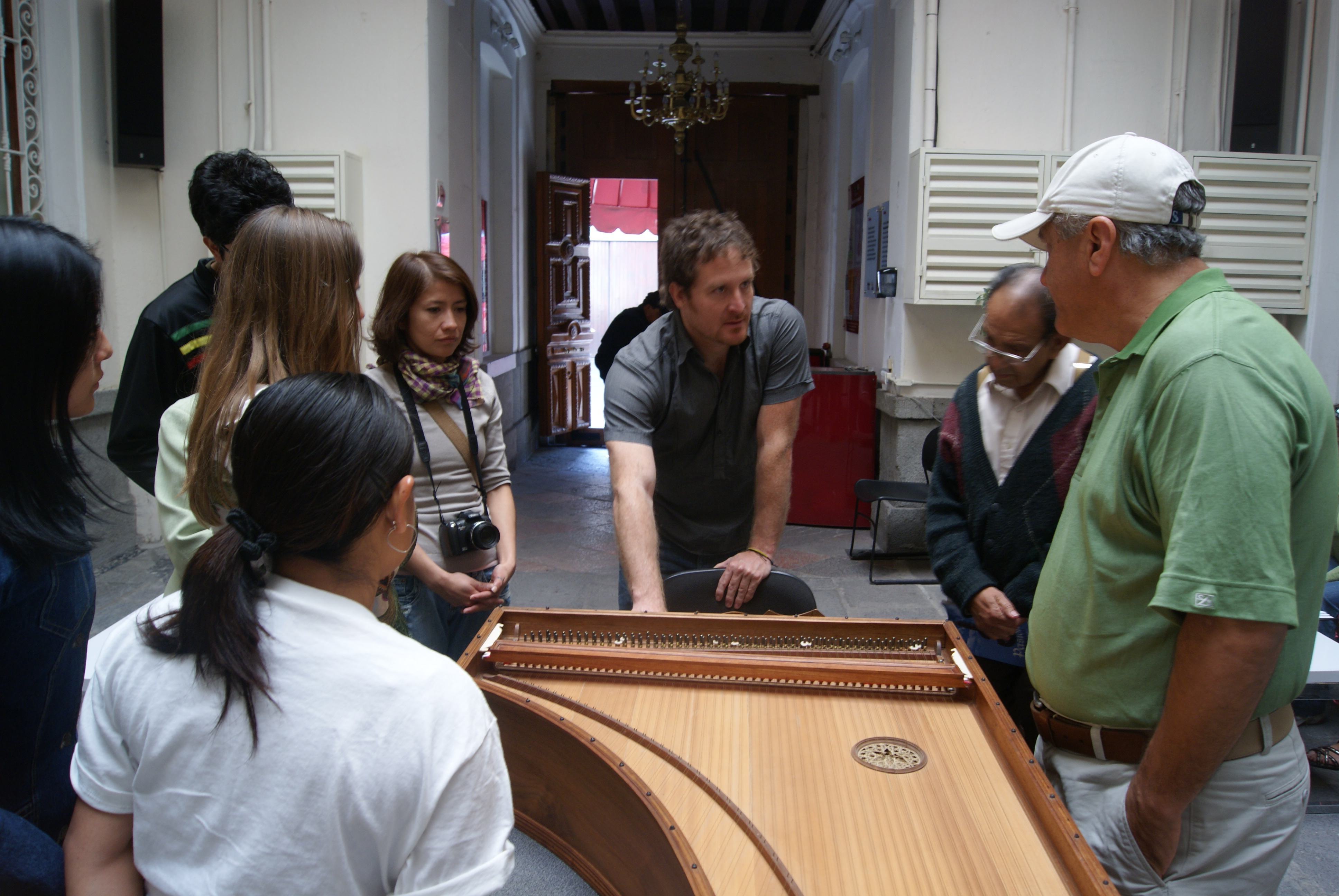 Curso-taller del Ensamble Galileo en el IMACP, Puebla, durante el Festival Pasión 2010